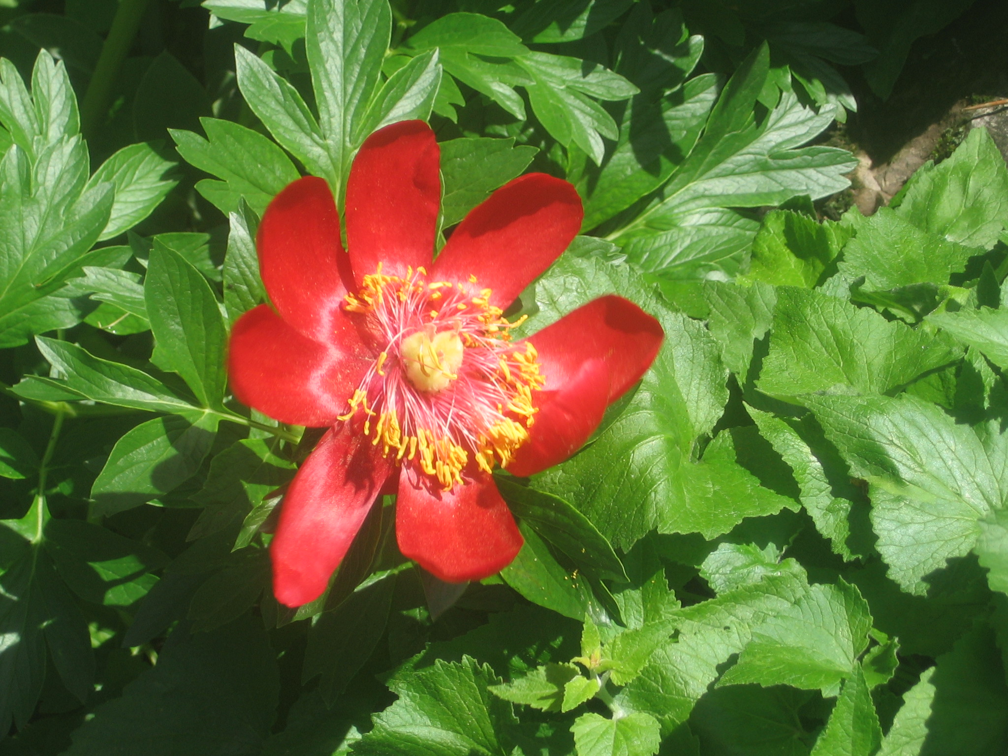 autor:Vladaig my photo